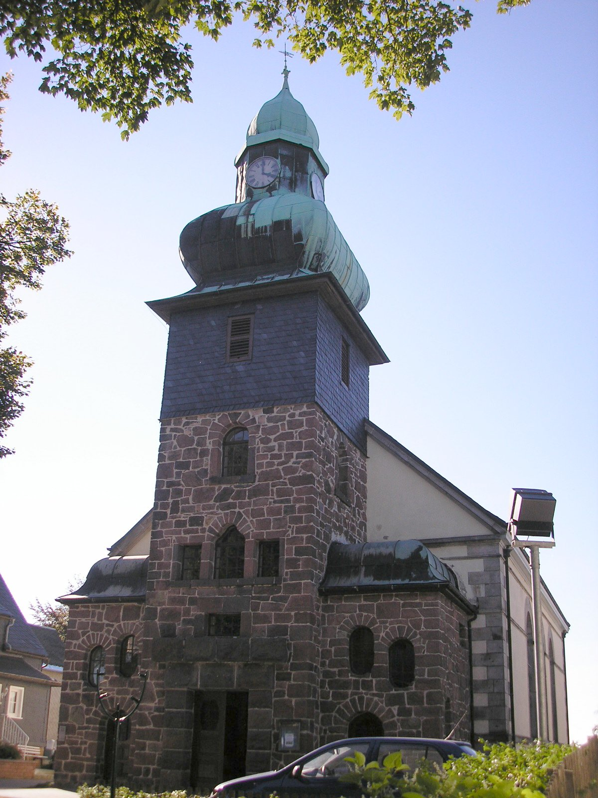 Kirche von Frauenwald (Thüringen).